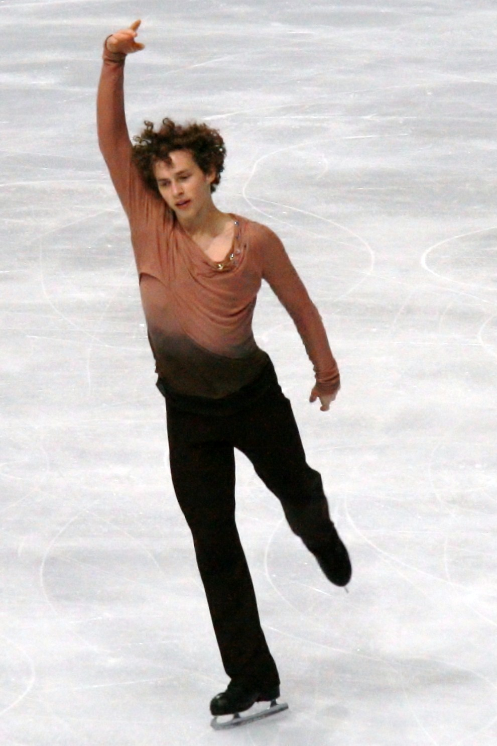 Адам Риппон на 2011 Trophée Eric Bompard